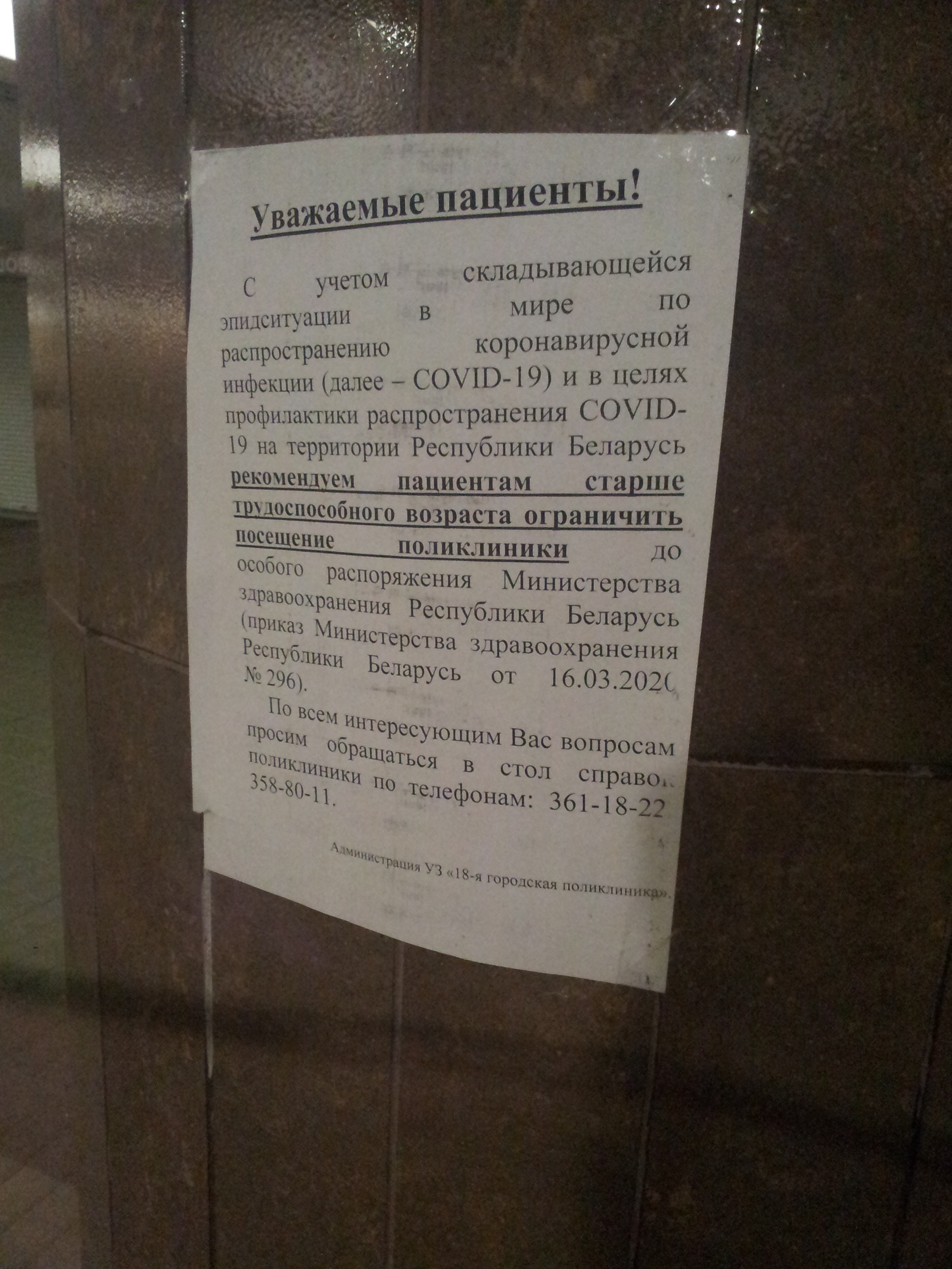 Текст объявление: Уважаемые пациенты! С учетом складывающейся эпидситуации в мире по распространению коронавирусной инфекции (далее - COVID-19) и в целях профилактики распространения COVID-19 на территории Республики Беларусь рекомендуем пациентам старше трудоспособного возраста ограничить посещение поликлиники до особого распоряжение Министерства здравоохранения Республики Беларусь (приказ Министерства здравоохранения Республики Беларусь от 16.03.2020 №296). По всем интересующим Вас вопросам просим обращаться в стол справок поликлиники по телефонам: 361-18-22, 358-80-11. Администрация УЗ "18-я городская поликлиника".